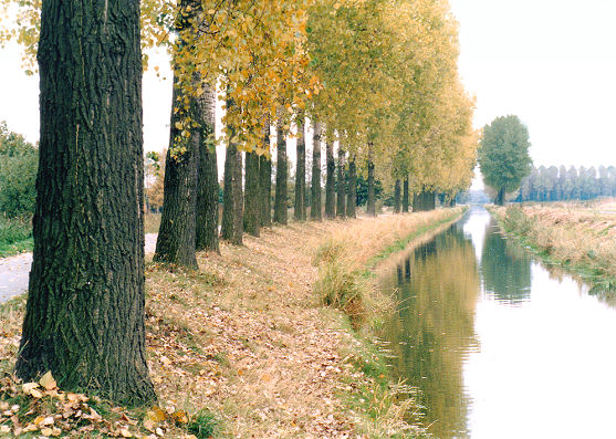 Aller bei Vorsfelde Foto aufgenommen von Benutzer Benutzer:Axel Hindemith, Oktober 1985